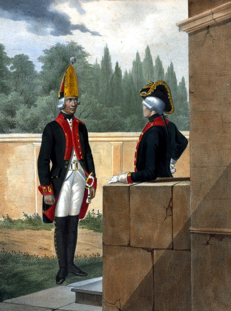 Гренадер и Офицер Владимирского Мушкетерского полка. 1797-1801. Данное изображение также было использовано в статье «Владимирский, 61-й пехотный, полк» опубликованной в шестом томе «Военной энциклопедии», который был издан книгоиздательским товариществом Ивана Дмитриевича Сытина в 1912 году в столице Российской империи городе Санкт-Петербурге.